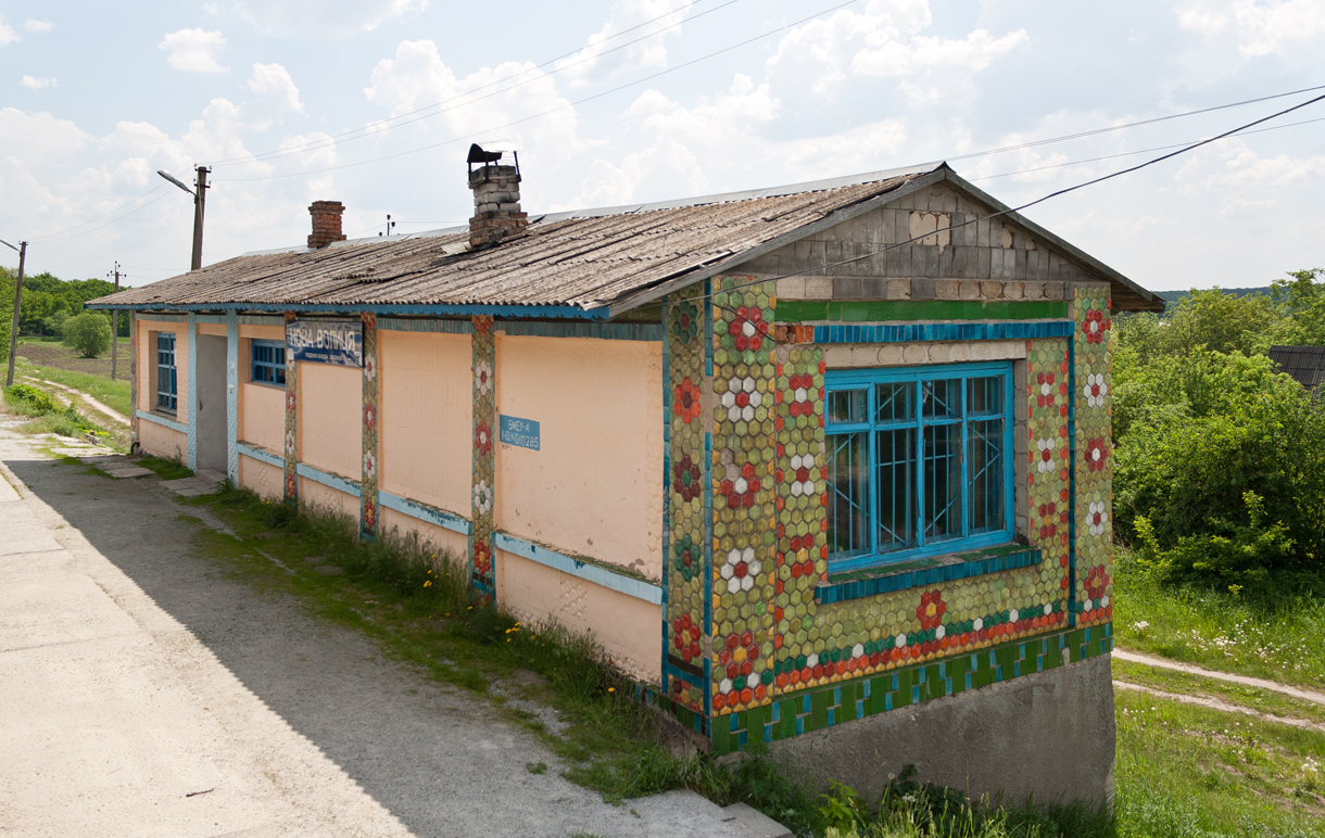 З.п. Нова Волиця